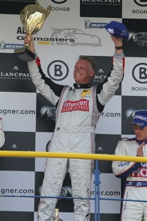 Oliver Mayer Titelbild